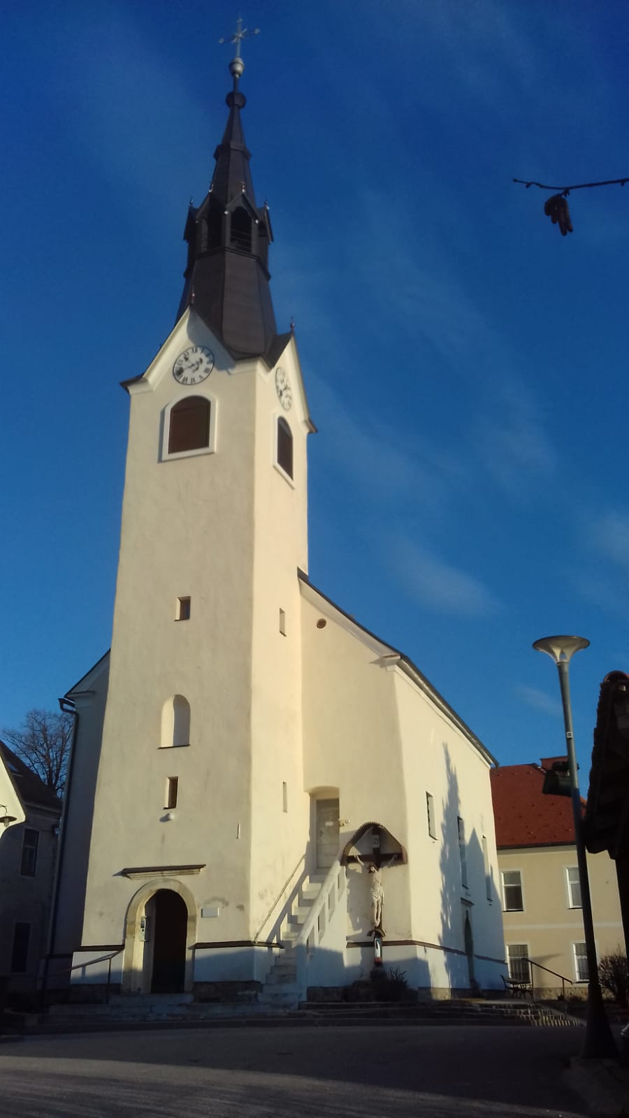 Župnijska cerkev Vseh svetnikov v Svetinju zgrajena leta 1730.